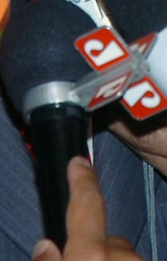 detalhe de um microfone da estação de rádio brasileira Rede Jovem Pan.